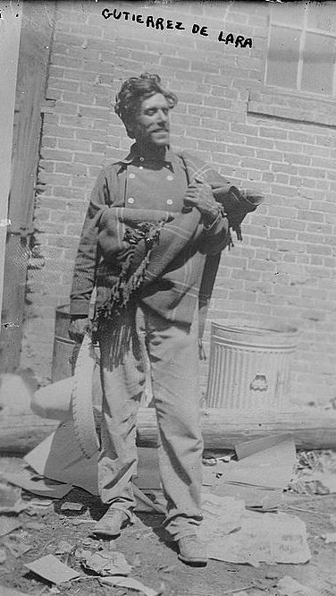 Lazaro Gutierrez de Lara